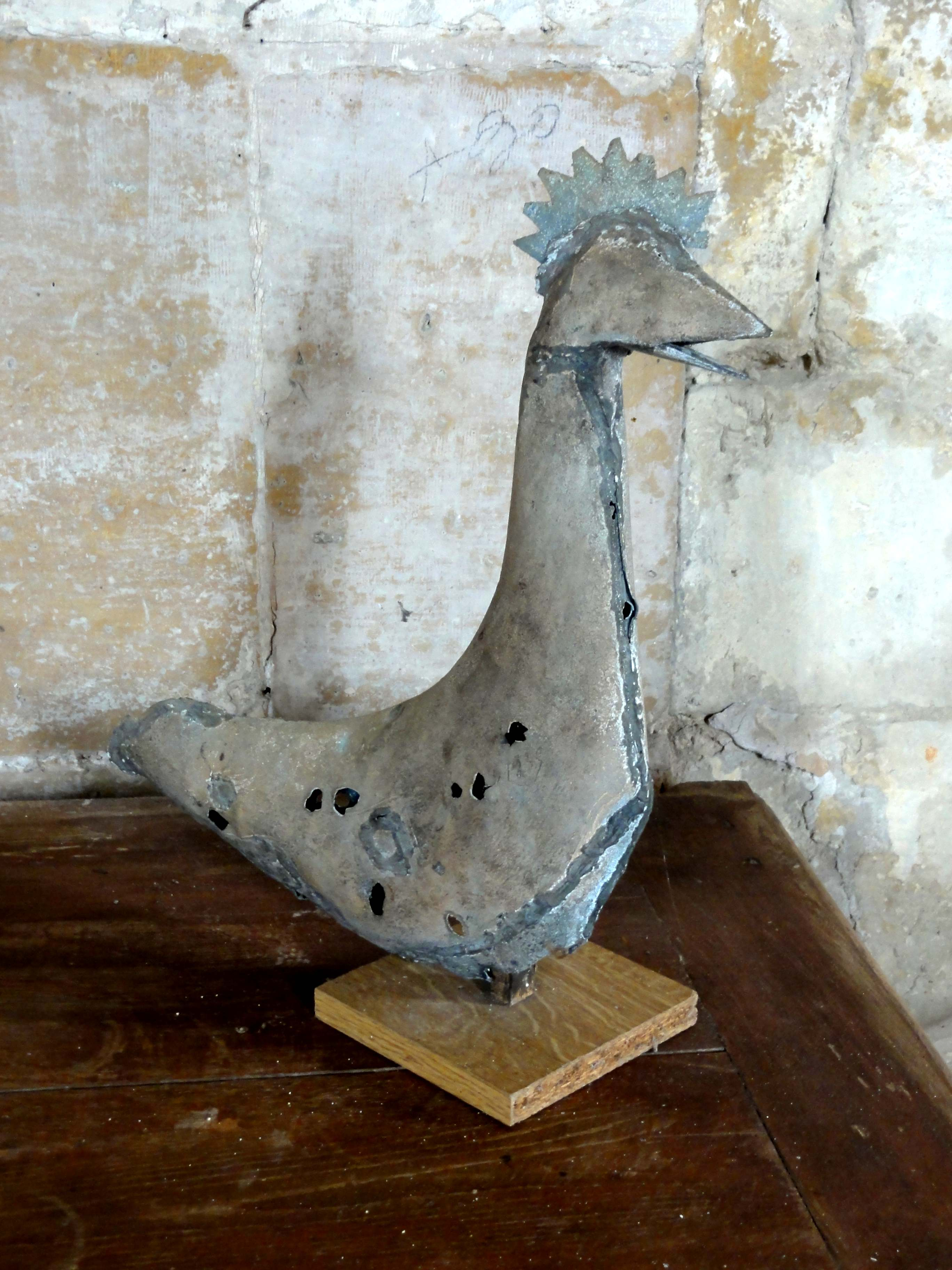 Mobilier de l'église (voir titre).